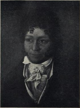 Norwegian: Stiftsamtmann Niels Arntzen Sem.